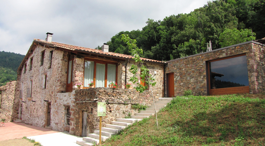 Foto de la fachada de la casa rural can Soler de Rocabruna. Esta casa fue rehabilitada en 2011 y ahora se practica el turismo rural activo.